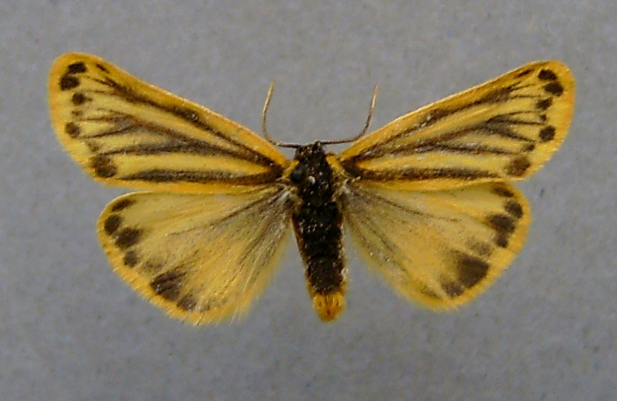 Setina aurita, Hochsölden